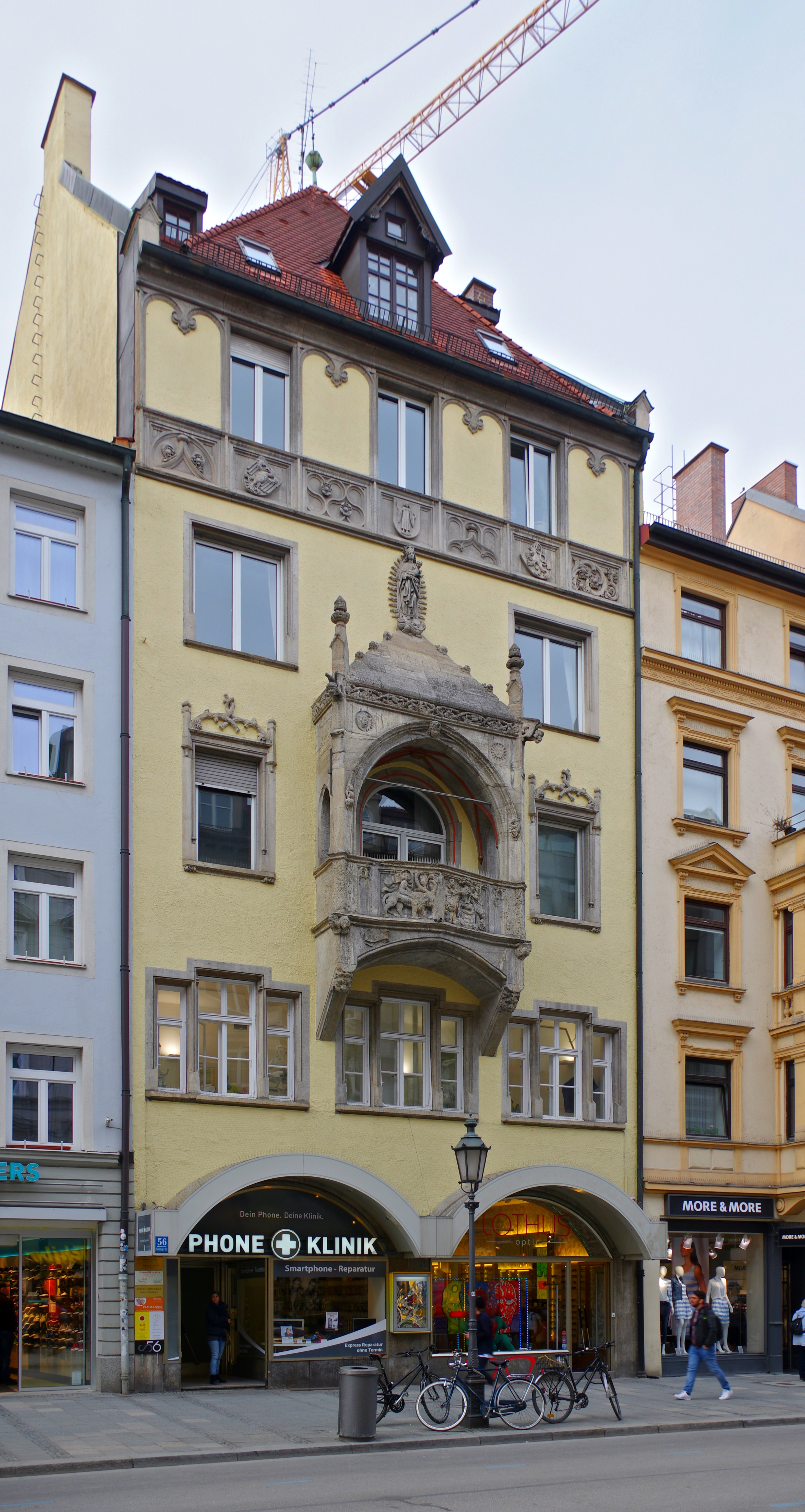 München, Sendlingerstraße 56; Akten-Nr. D-1-62-000-6488